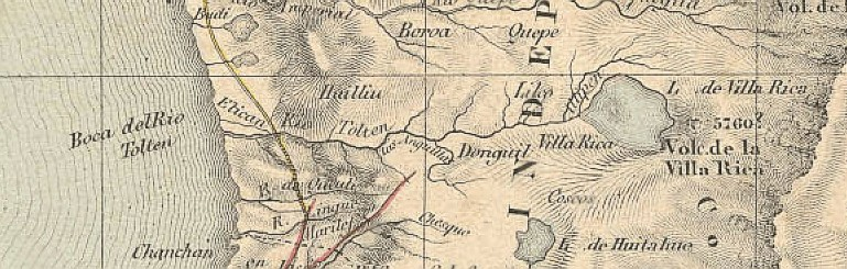 El río Toltén, detalle del mapa de Chile incluido en el Atlas de Gay.